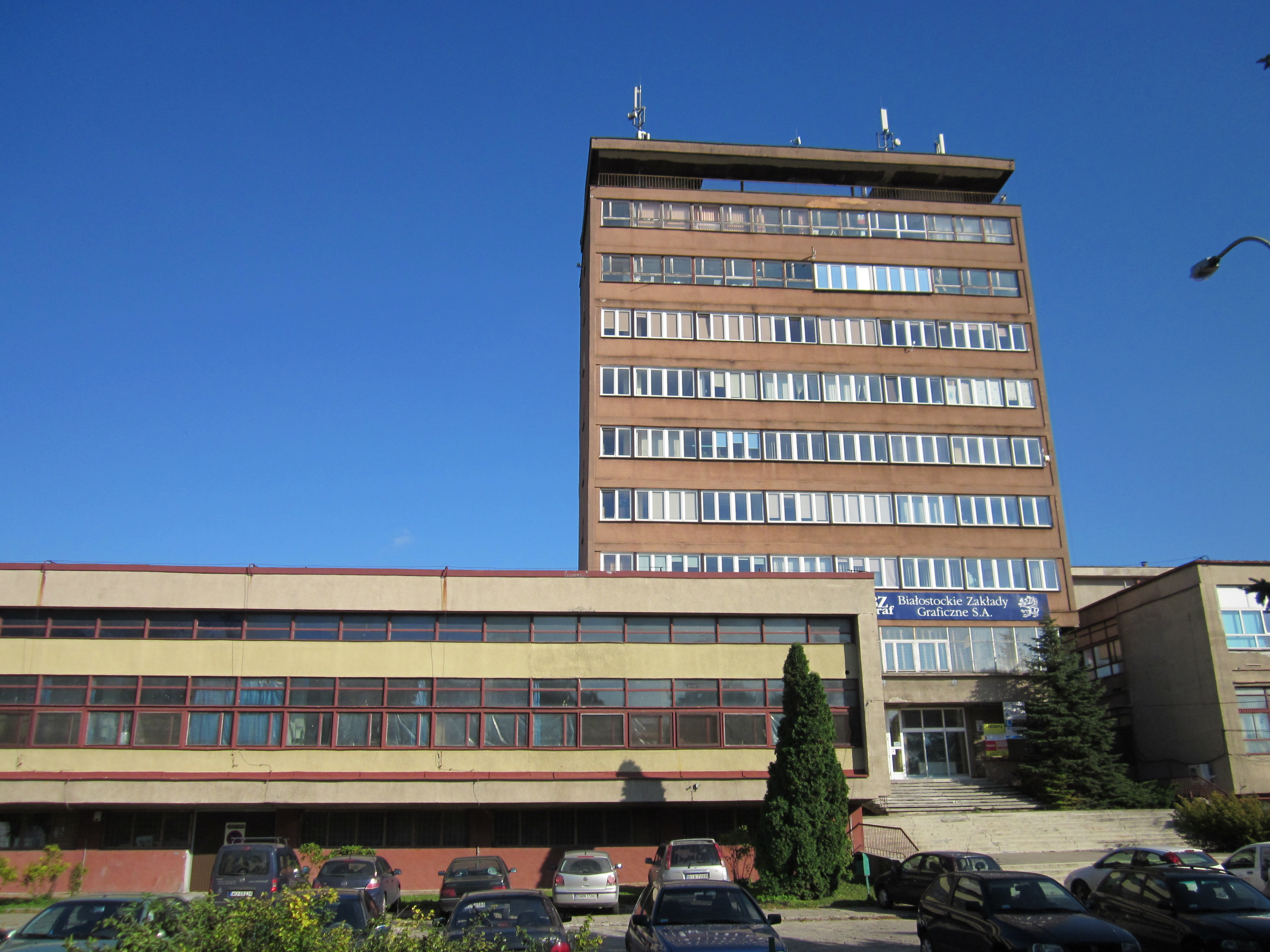 Budynek Białostockich Zakładów Graficznych przy ul. 1000 - lecia Państwa Polskiego 2